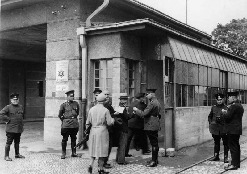 Beuthen Deutsche Grenzwache auf der Straße nach Königshütte.